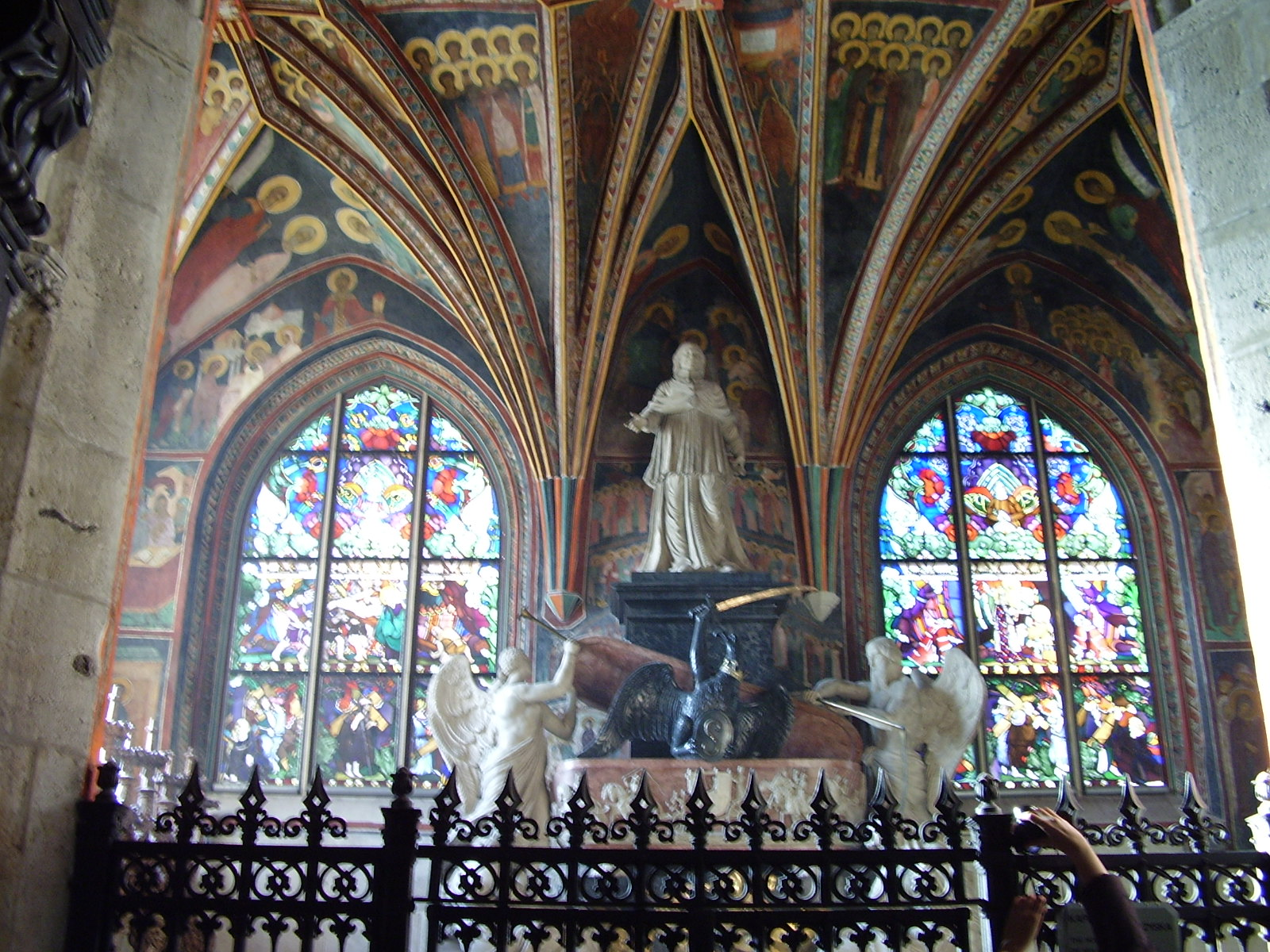 Krakow